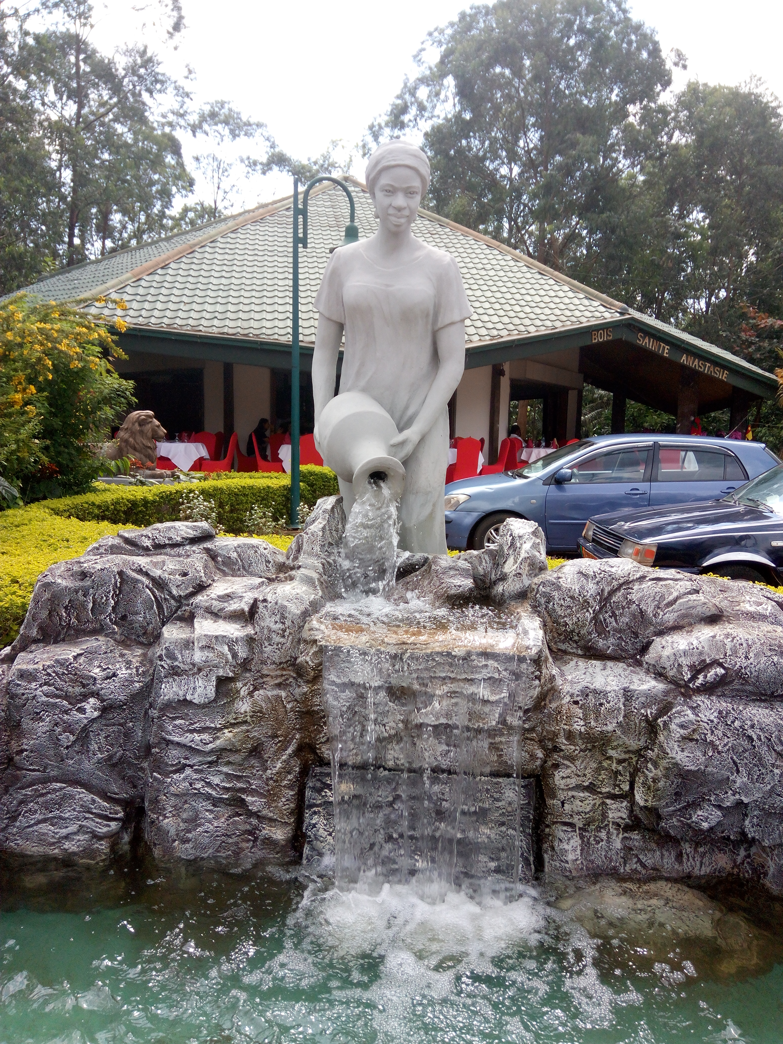 L'un des plus grands restaurants de la ville de Yaoundé. Il est en même temps un parc d'attraction situé au Carrefour Warda.